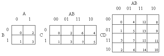 Mapas de Karnaugh para 2, 3 y cuatro varables